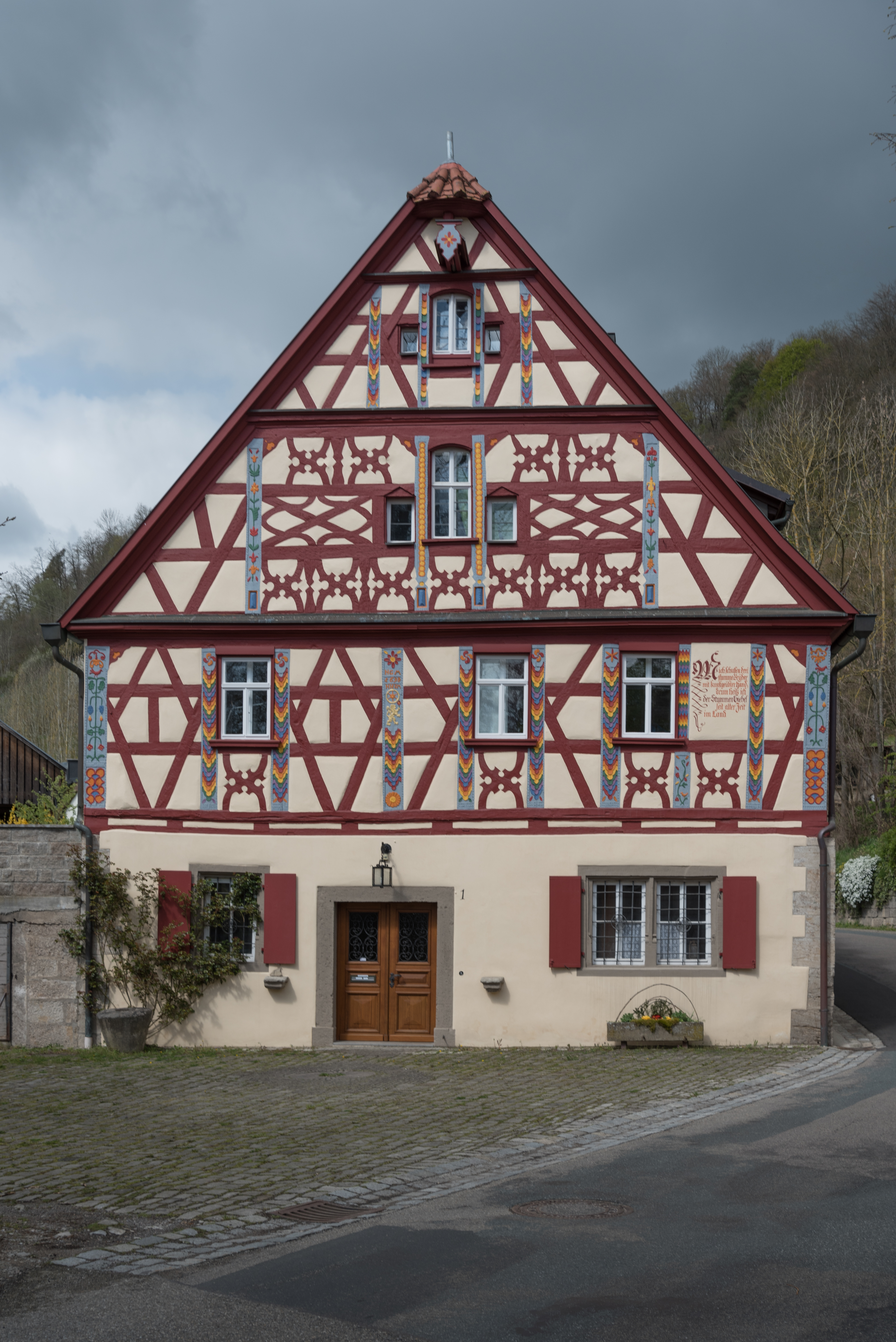 Adelshofen, Tauberzell, Haus Nr. 1